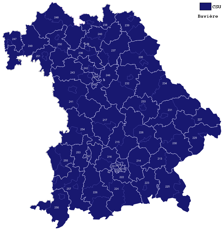 Districts de la Bavière lors des élections fédérales de 2009.